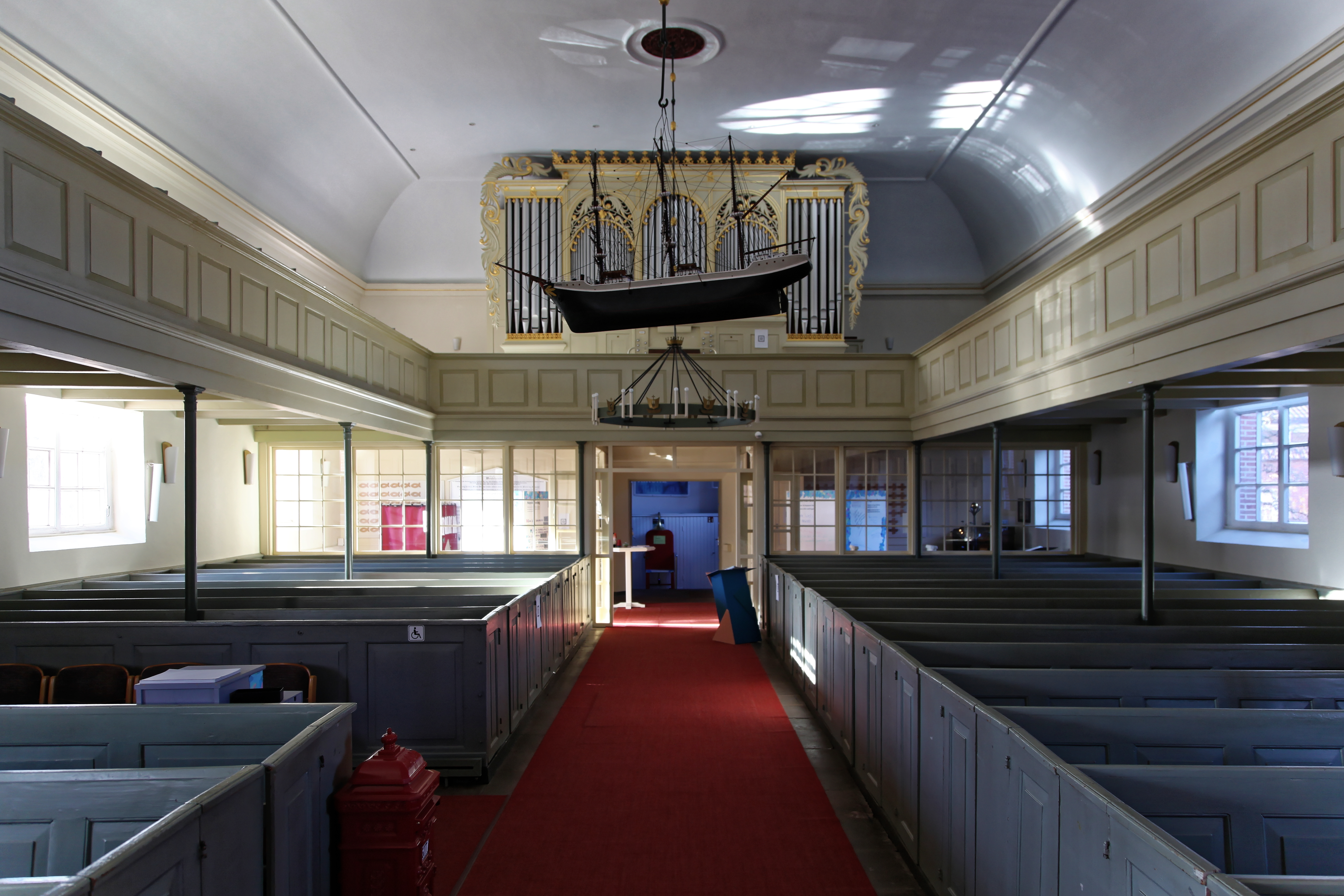 Hoffnungskirche, Untenende in Rhauderfehn